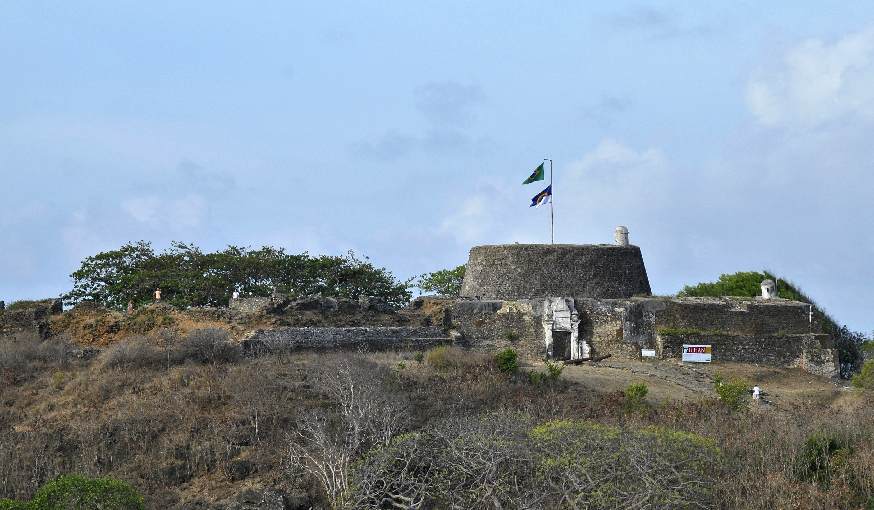 fortificação construída pelos portugueses no local do forte erguido pelos holandeses no seculo XVII